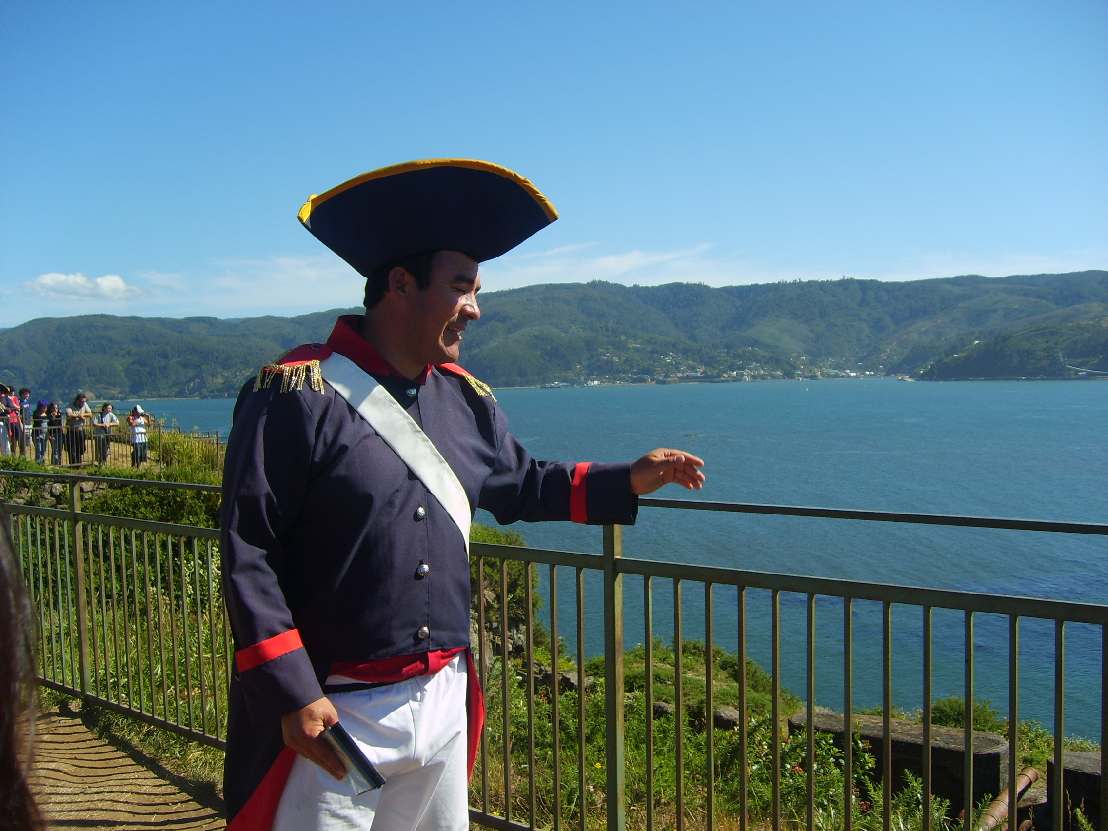 Fotografía de las baterias del Castillo de la Pura y Limpia Concepción de Monfort de Lemus en la ciudad de Valdivia, Chile. Foto obtenida por el autor Valo en Febrero de 2007